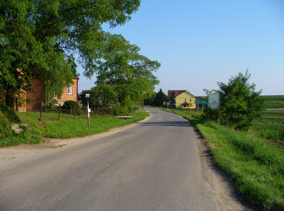 Rudno Górne, wjazd od strony Łaganowa